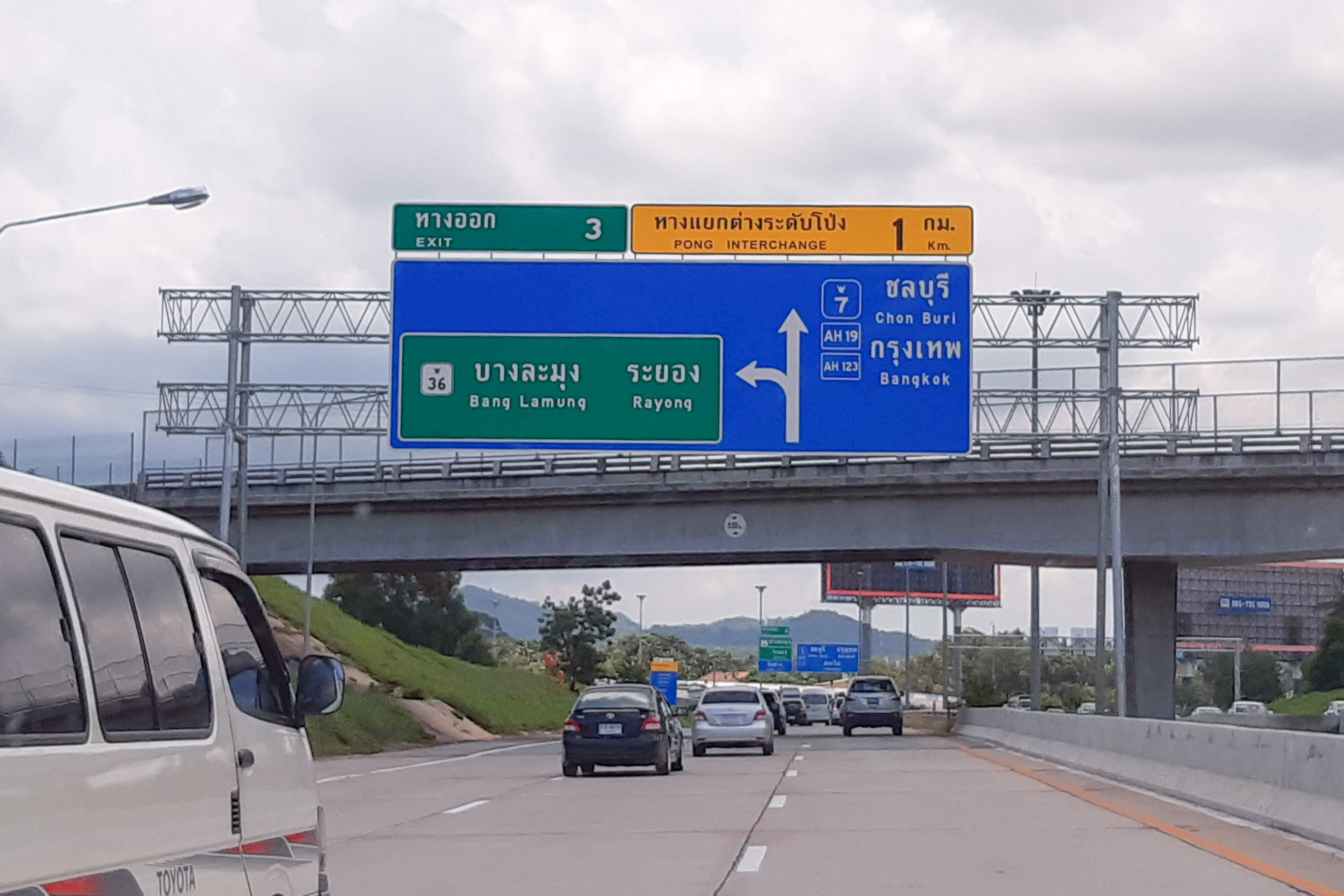 Head to Chon Buri